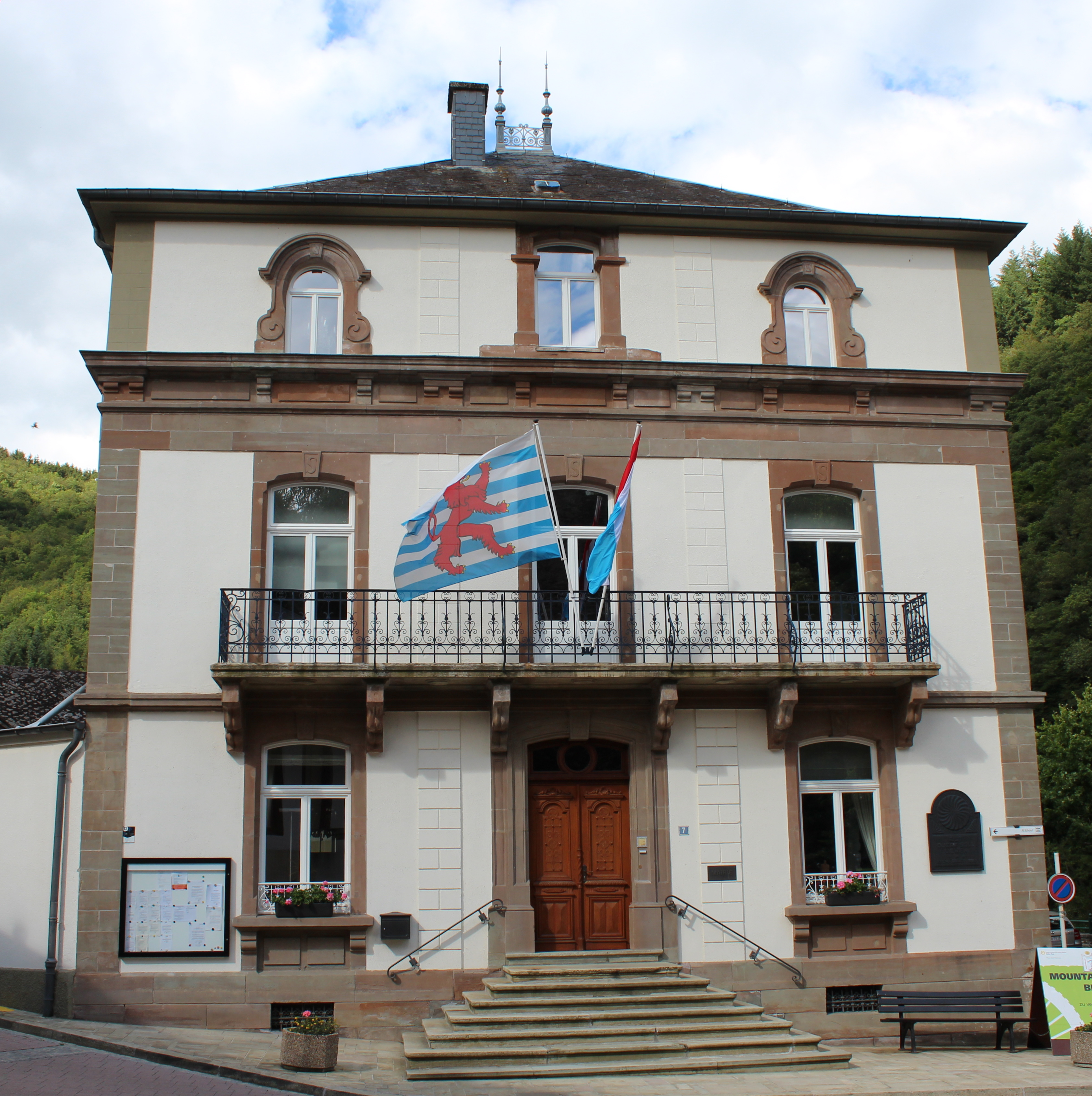 Stadhaus vun der Gemeng Esch-Sauer